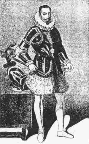 Donal O'Sullivan (1561-1613)